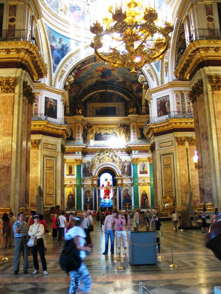 Interieur Izaäkkathedraal